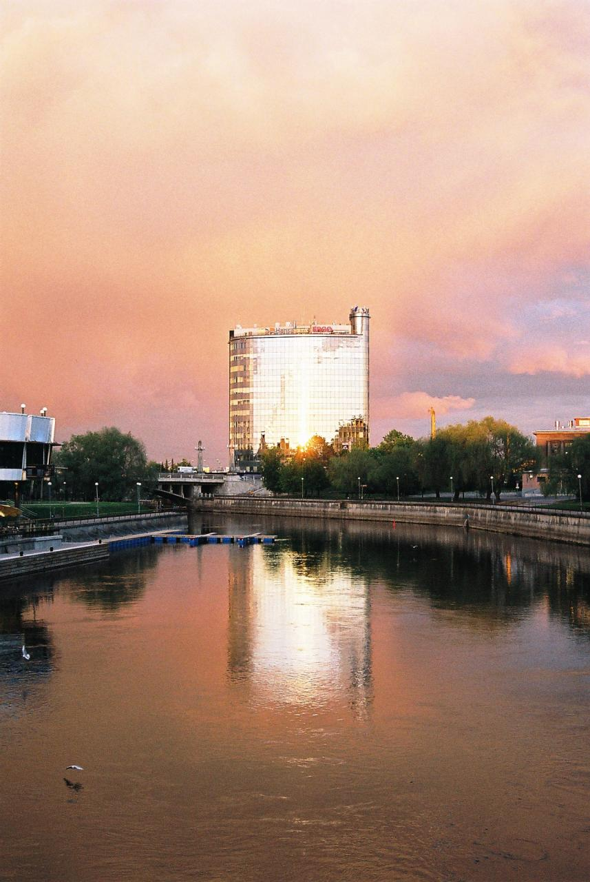 Emajõgi in Tartu, Estonia